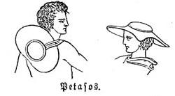 Petasos antique Greek hat